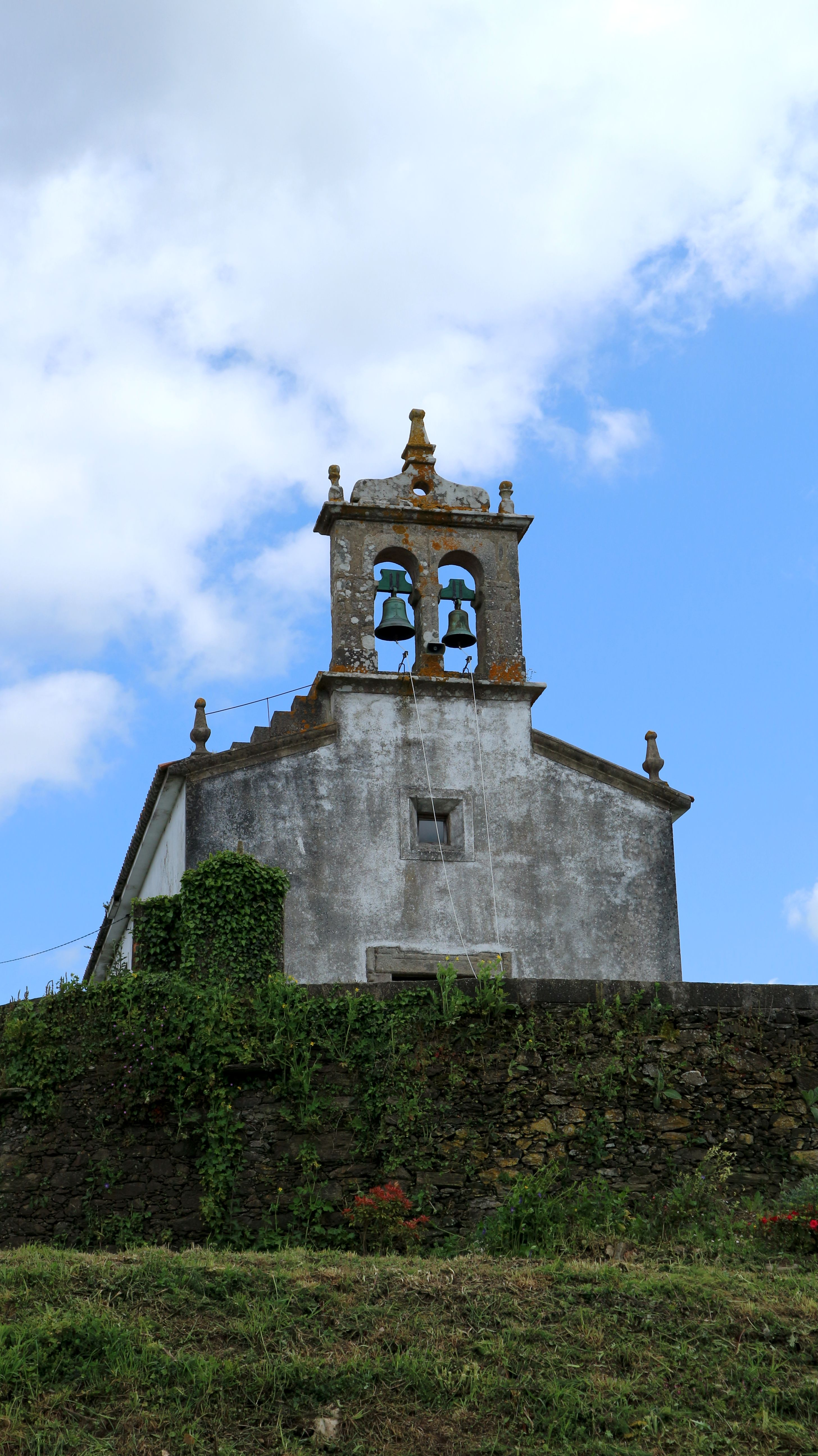 Igrexa de Santaia de Probaos. Probaos, Oza-Cesuras.